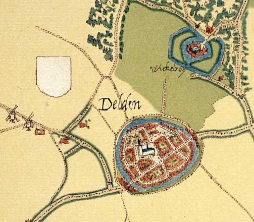 Fragment van de kaart van Delden door Jacob van Deventer uit circa 1565.